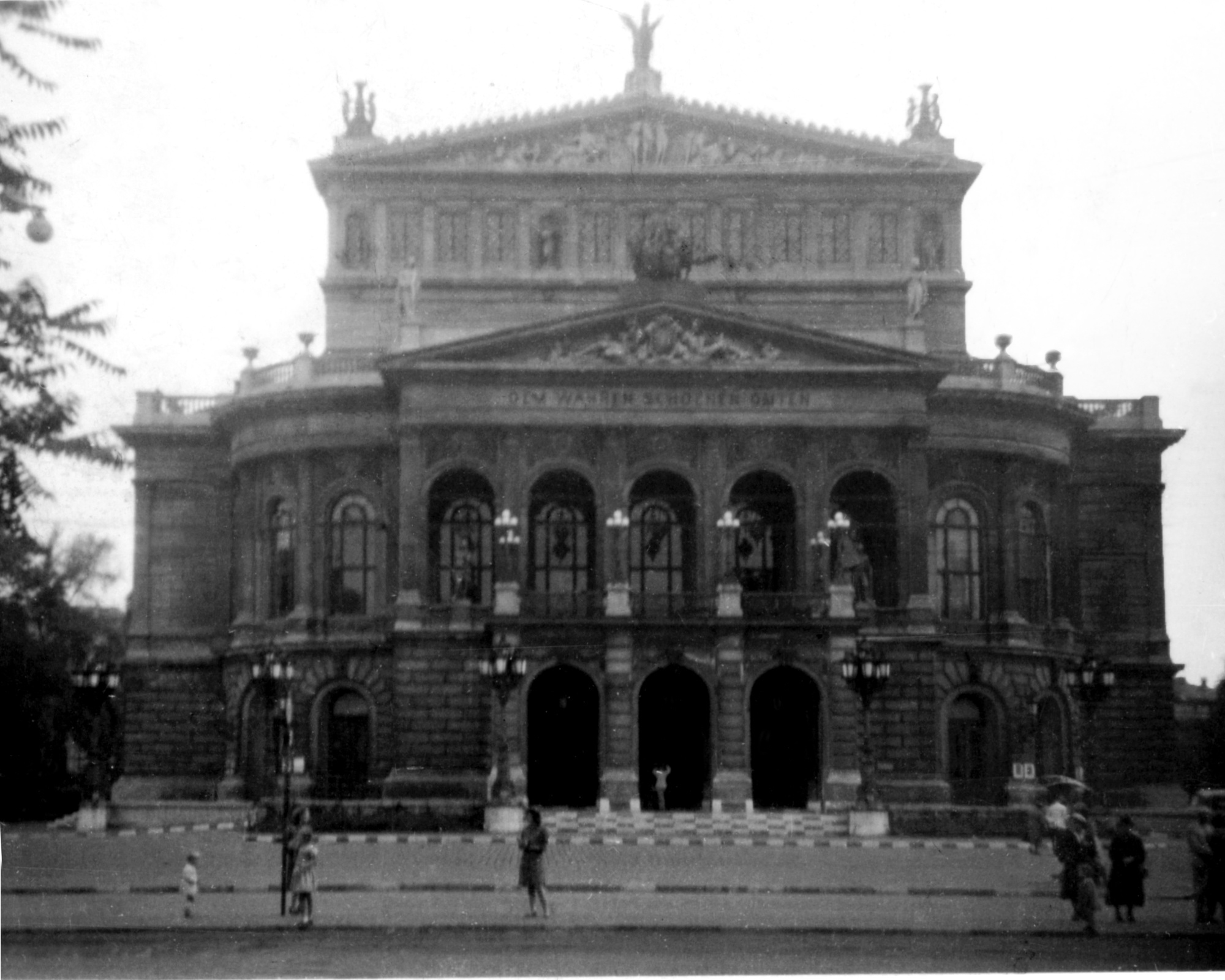 Ansicht der Alten Oper (Frankfurt am Main)